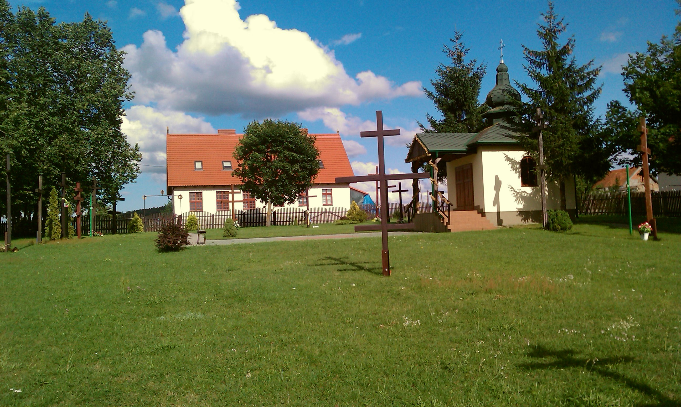 Chrzanowo - cerkiew parafialna pw. św. Apostołów Piotra i Pawła